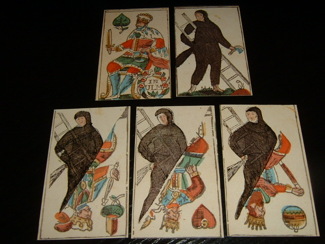 Präparierte Karten zum Zuabern, 1. Viertel des 19. Jahrhunderts, Ulm